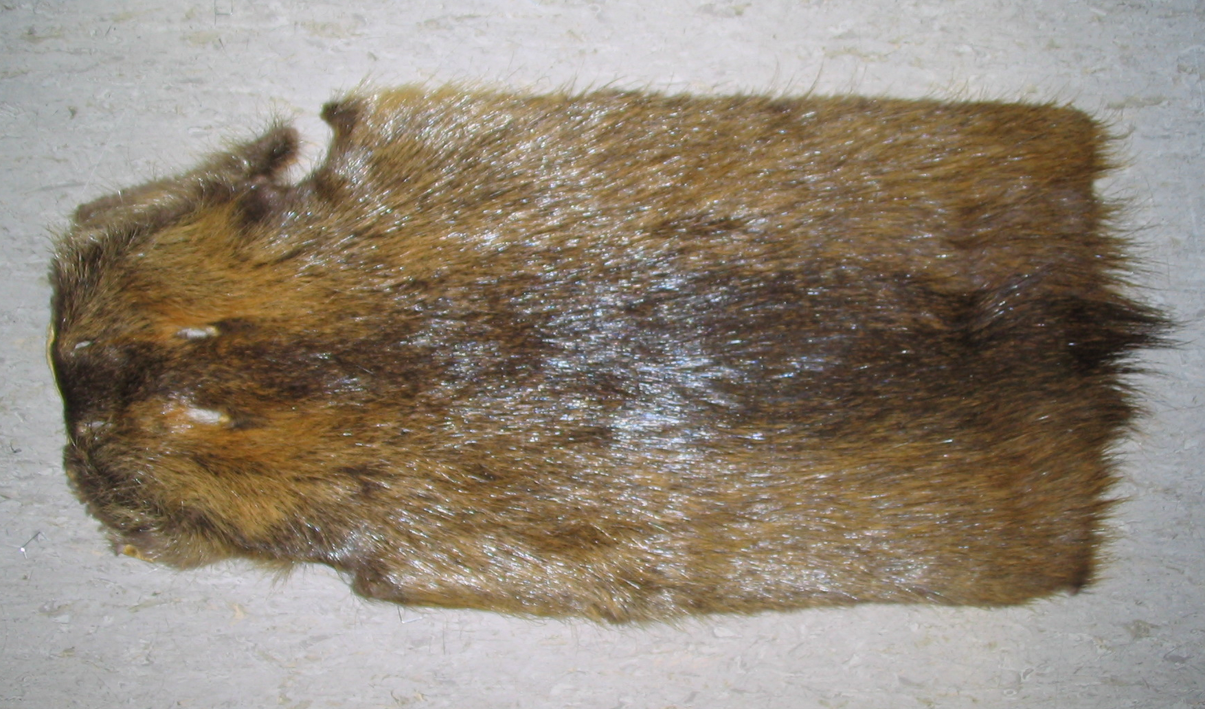 Naturelles Nutriafell